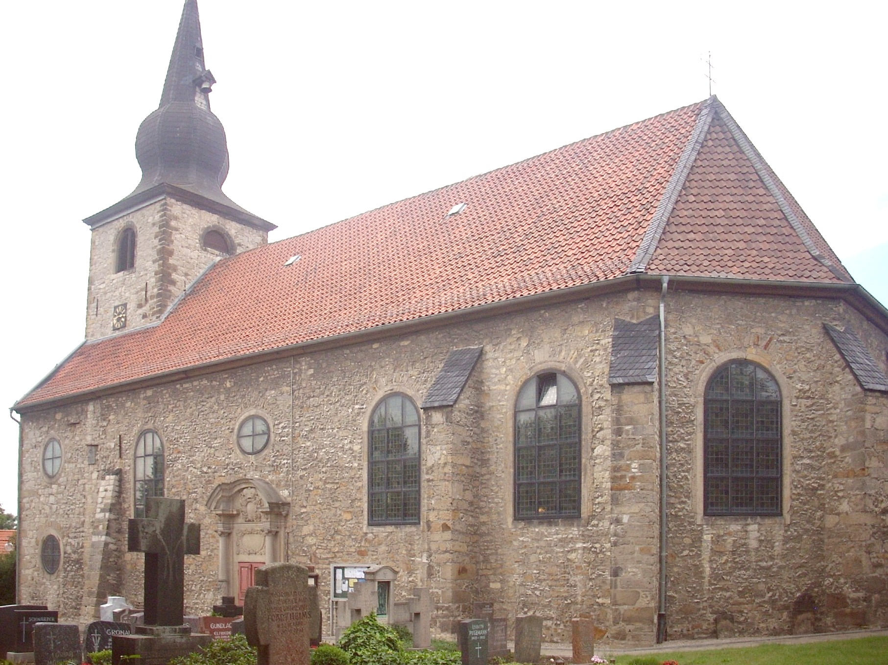 Kath. Kirche St. Pankratius, Groß Förste, Landkreis Hildesheim